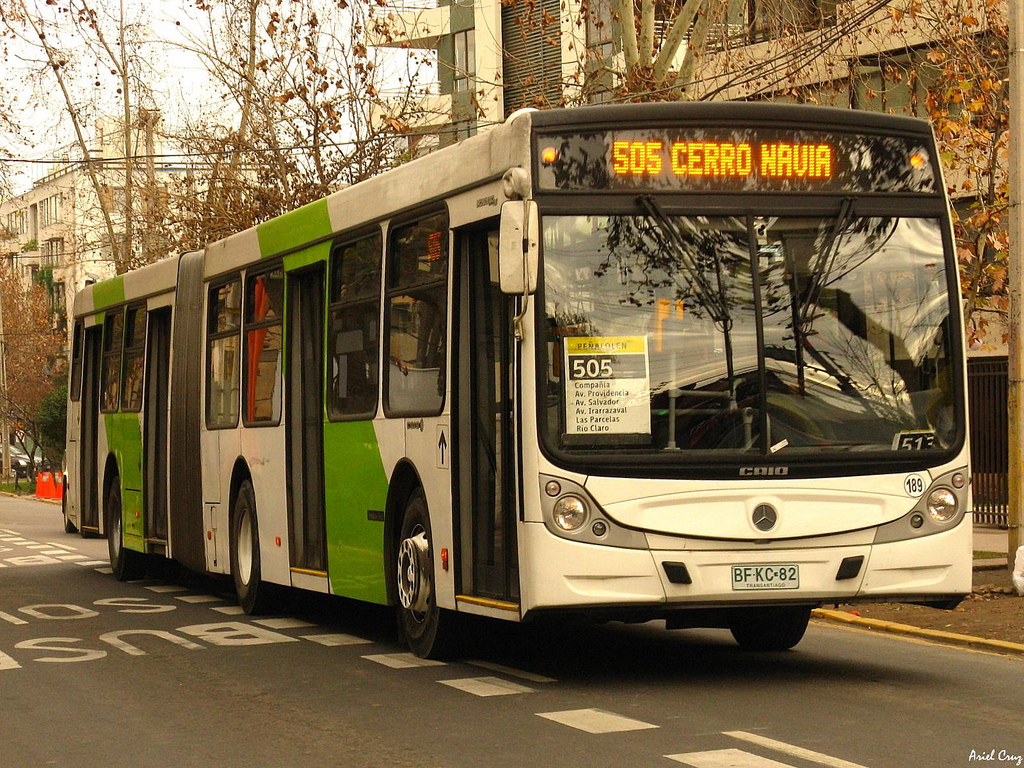 Recorrido 505 del sistema Transantiago, en Santiago de Chile.